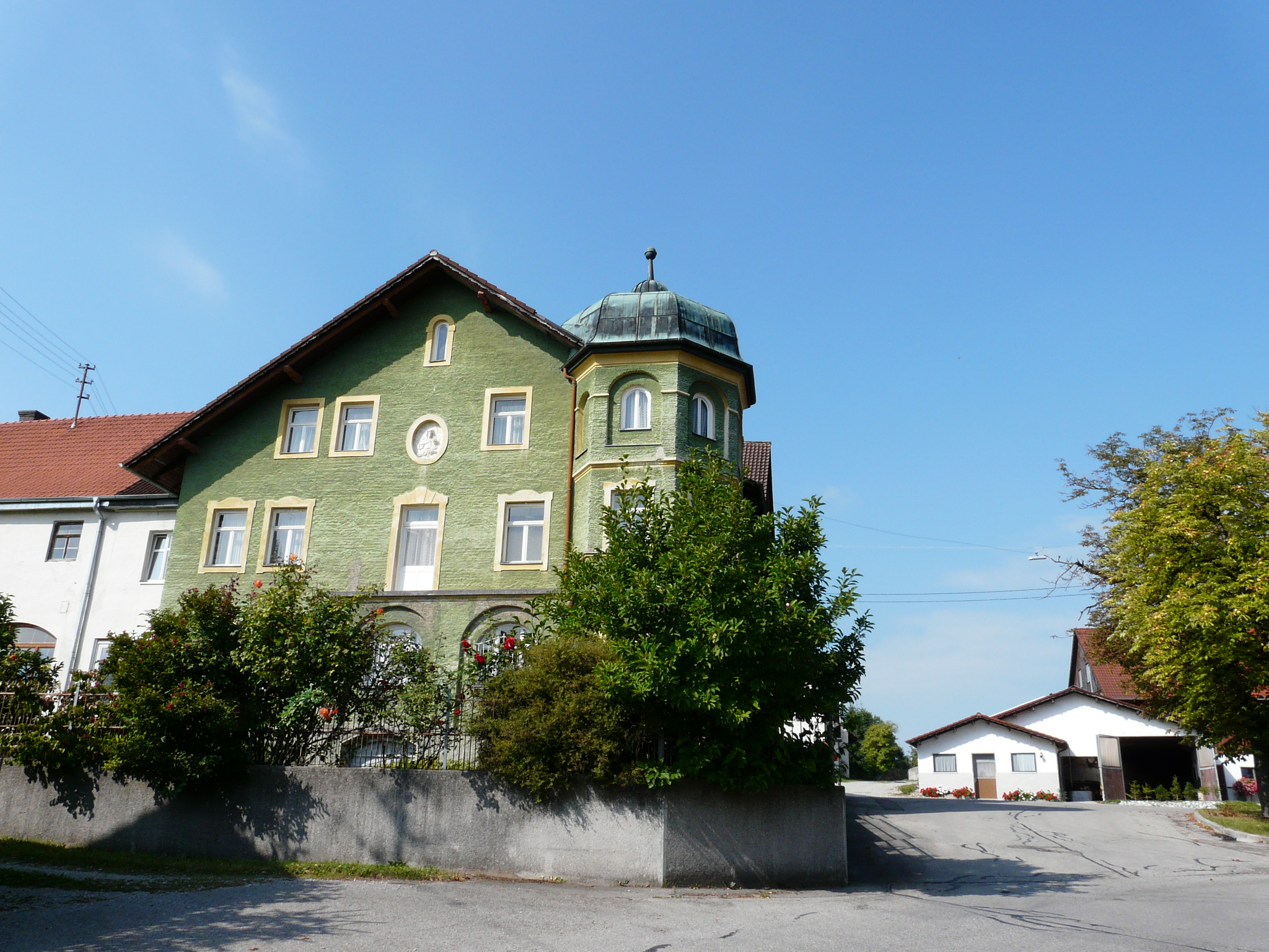 Bayersried 14, Eggenthal